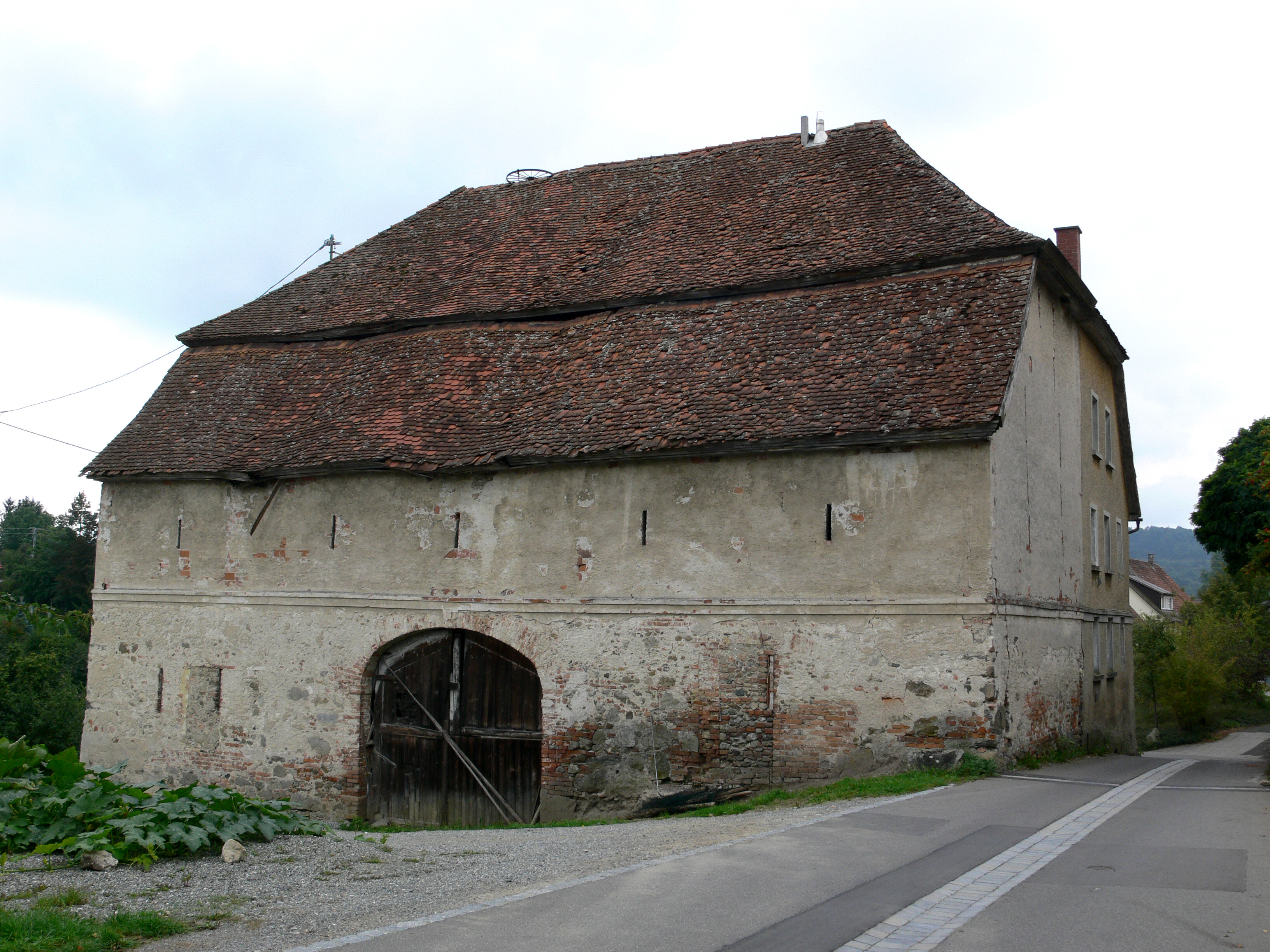 Scheuer in Ebenweiler, Landkreis Ravensburg